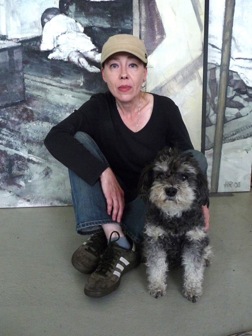 Heike Ruschmeyer vor ihrem Gemälde "Schlaf Kindlein, schlaf"